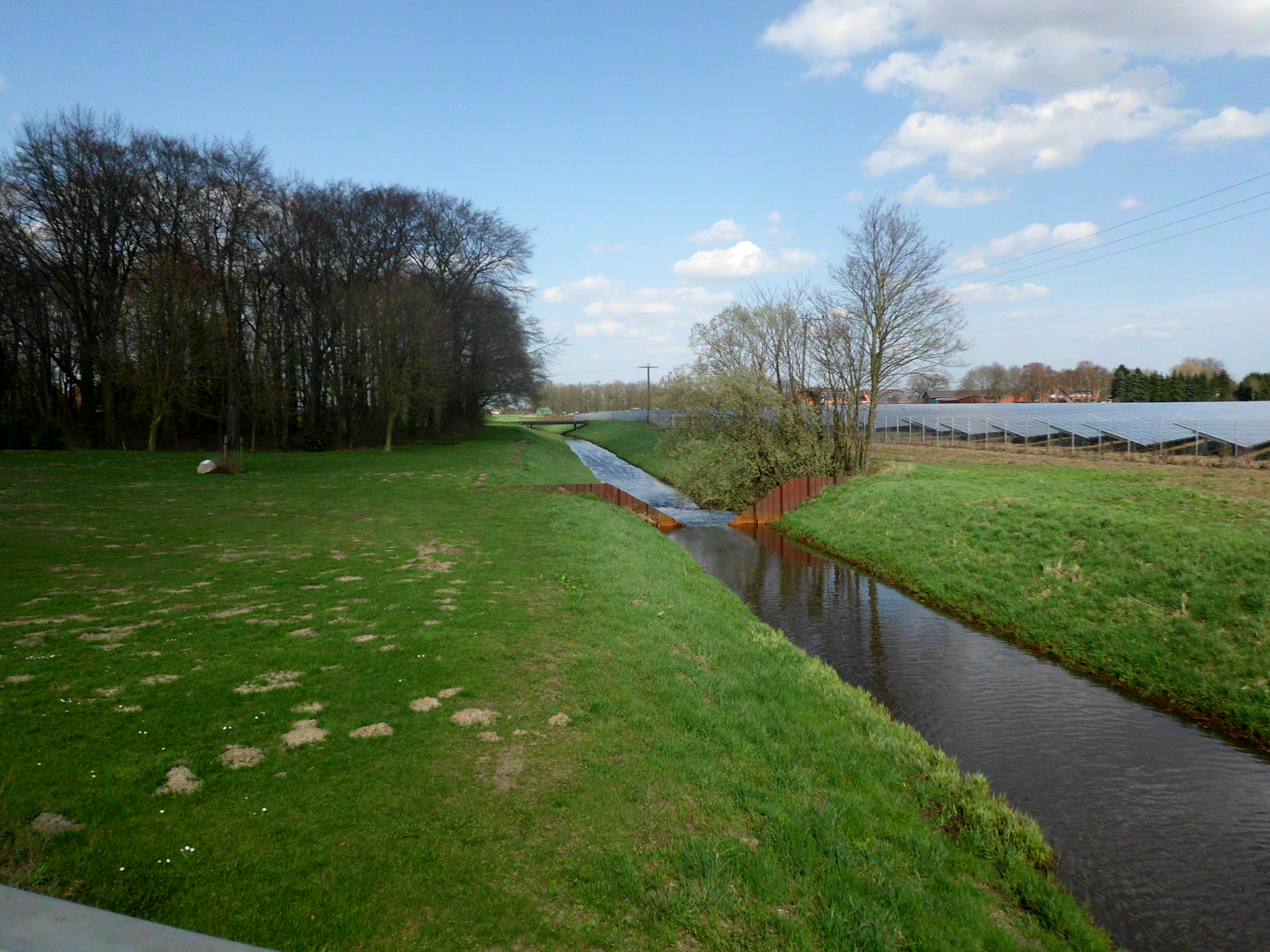 Wagenfelder Aue Blickrichtung Nord auf der Brücke in Wagenfeld